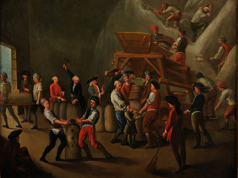 Tableau anonyme du XVIII - Musée de la Douane Bordeaux